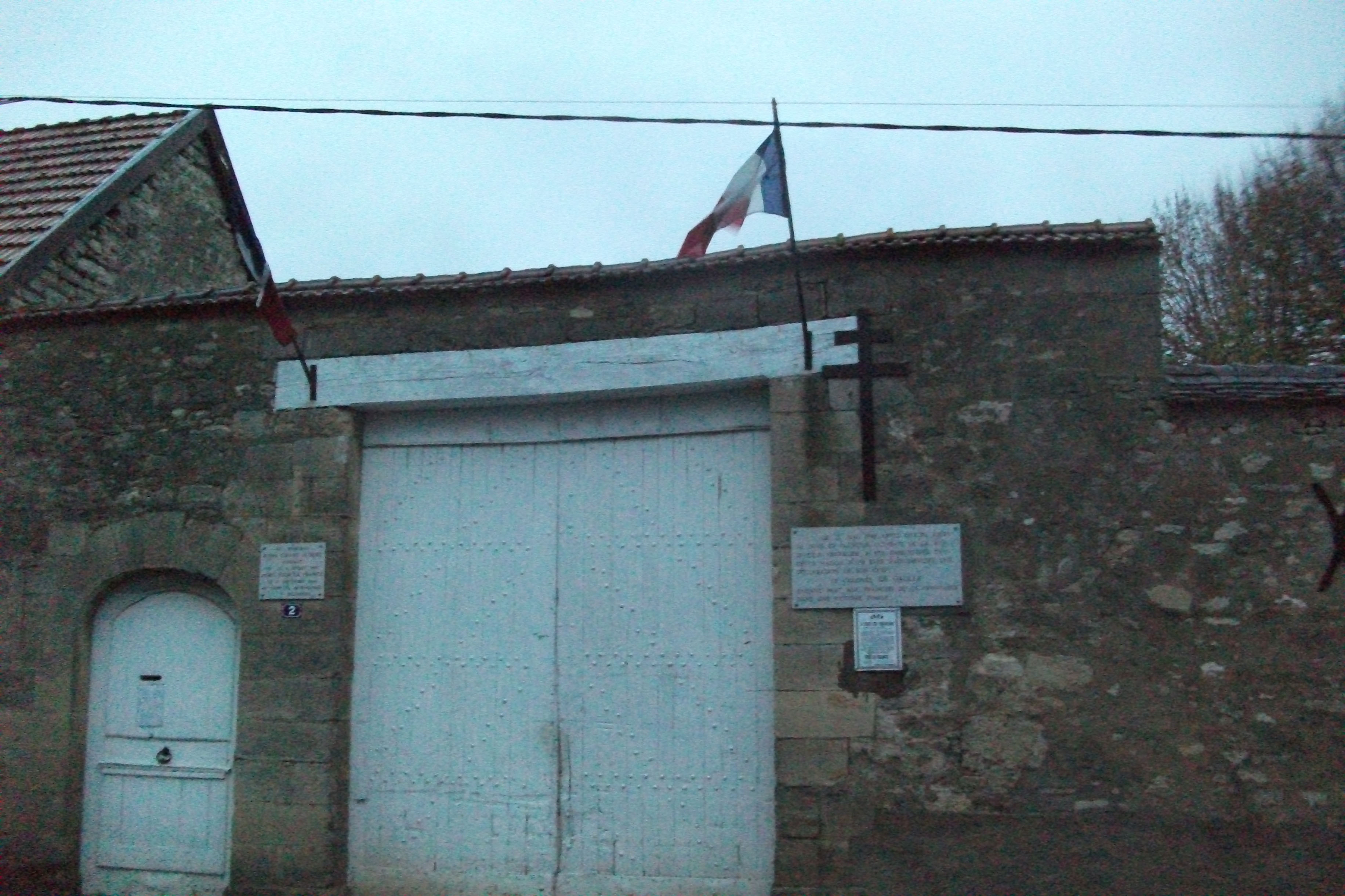 Savigny-sur-Ardres_mémorial à l'appel du général de Gaulle, le 21 mai 1940, chef de la 4e division blindée, après de dur combat à la résistance (sous la croix de Lorraine) et à la mémoire de Joseph Tirant de Bury, mort en déportantion le 17 sept 1944 au camp de Neuengamm.